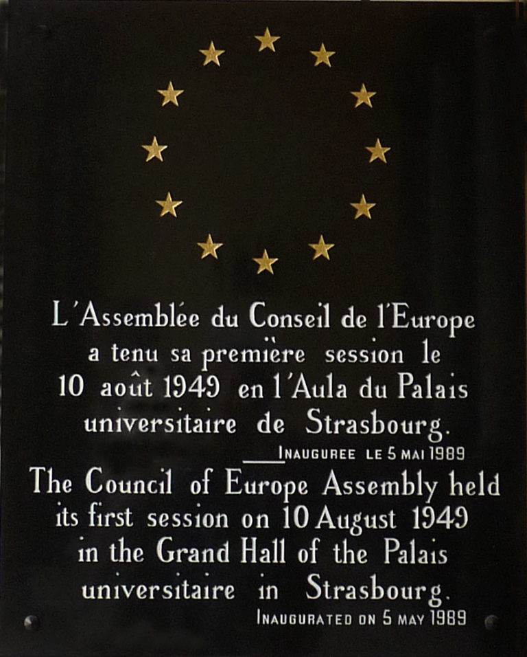 Plaque apposée dans l'entrée du Palais Universitaire de Strasbourg, commémorant la première session de l'Assemblée du Conseil de l'Europe le 10 aôut 1949 dans l'aula du Palais Universitaire.